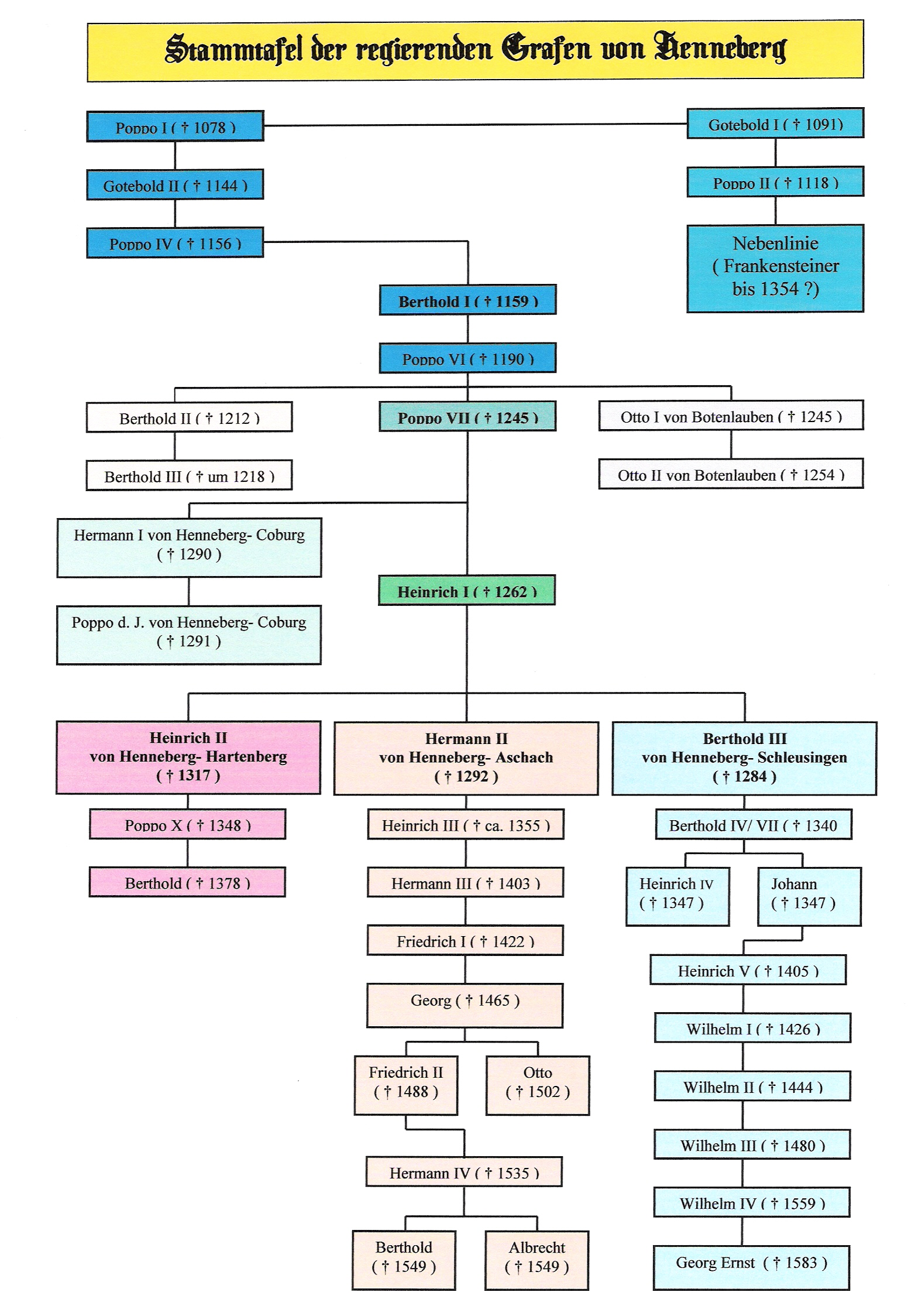 Stammtafel der Henneberger Grafen / Wissens-Quelle "Henneberg durch Land und Zeit" - eigenes Werk Willhelm01